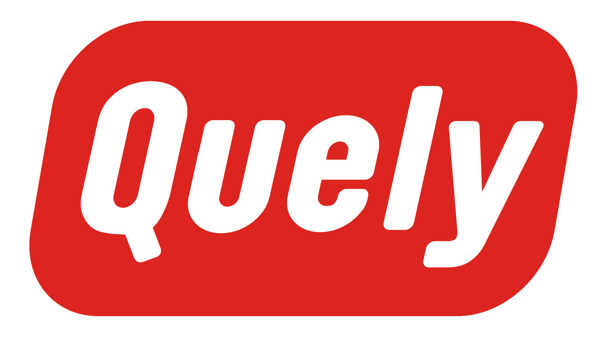 Logo oficial de la empresa Quely S.A., fabricantes de las Galletas Quely y las Quelitas.